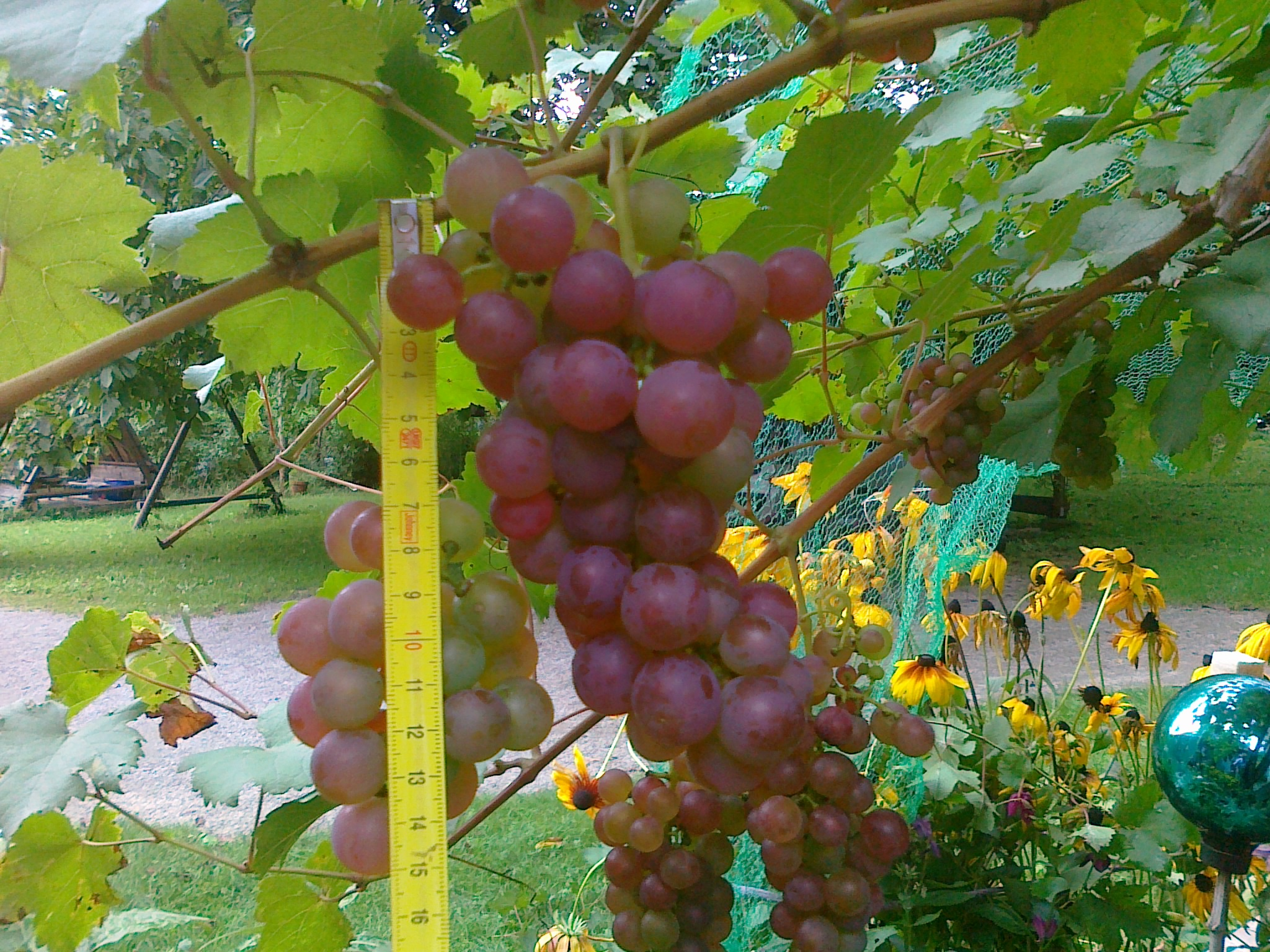 Vitis vinifera subsp. vinifera "Roter Gutedel" Früchte Weinsorten aus der "Alten Welt" können als "Edelweine" den Amerikanischen Rebsorten gegenübergestellt werden, was nichts mit der Qualität an sich zu tun hat. Amerikanische Reben werden regelmäßig als "Direktträger-Sorten" bezeichnet, da seit Einschleppung der amerikanischen Reblaus die gefährdeten Edelreben auf amerikanische Weinarten gepfropft werden mußten. Die Unterlagen wurden sodann als "Direktträger" bezeichnet, der echte sogenannte "Uhudler"-Wein wird aus deren Früchten gekeltert.